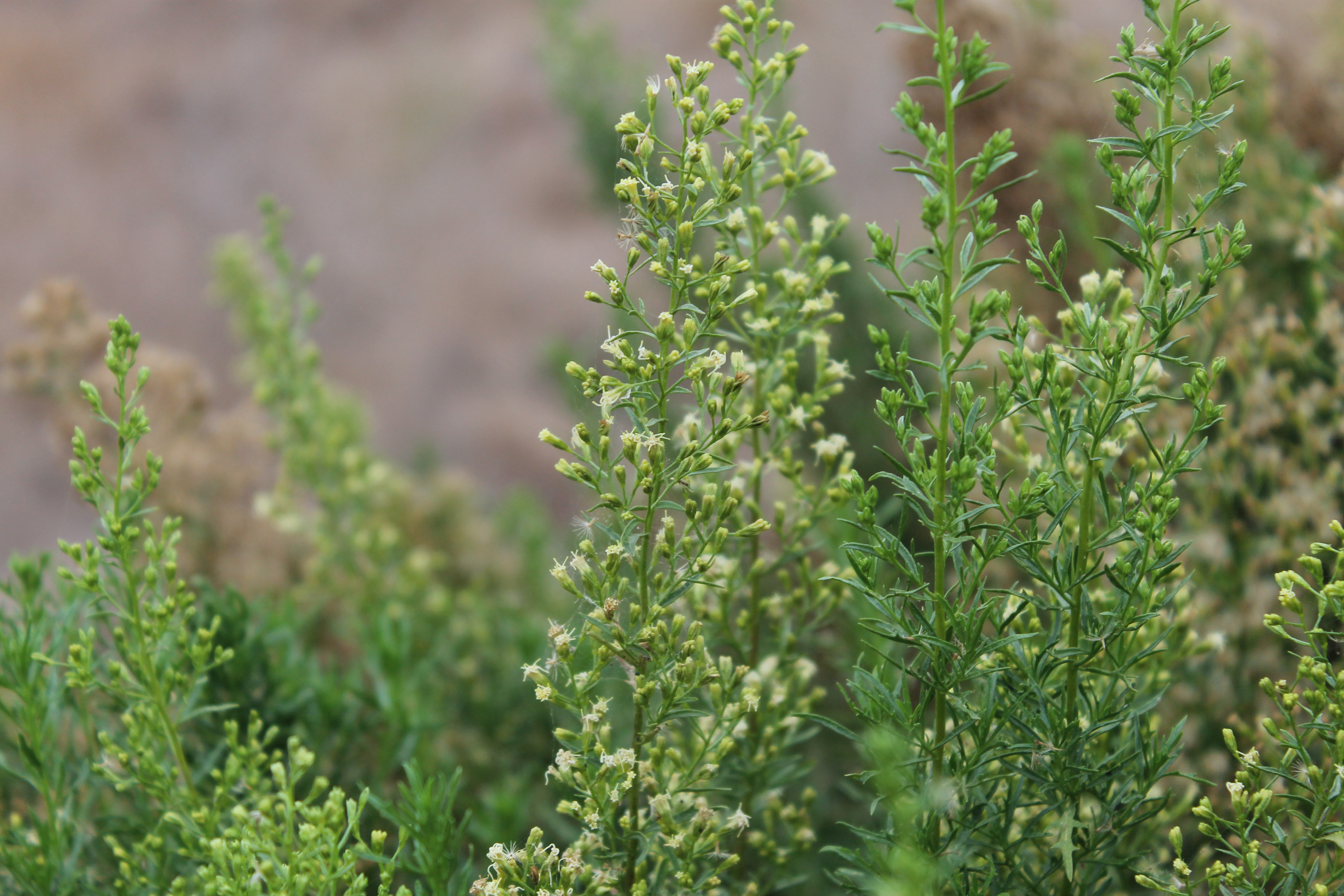 Notese las flores de la tribu de Eupathorium